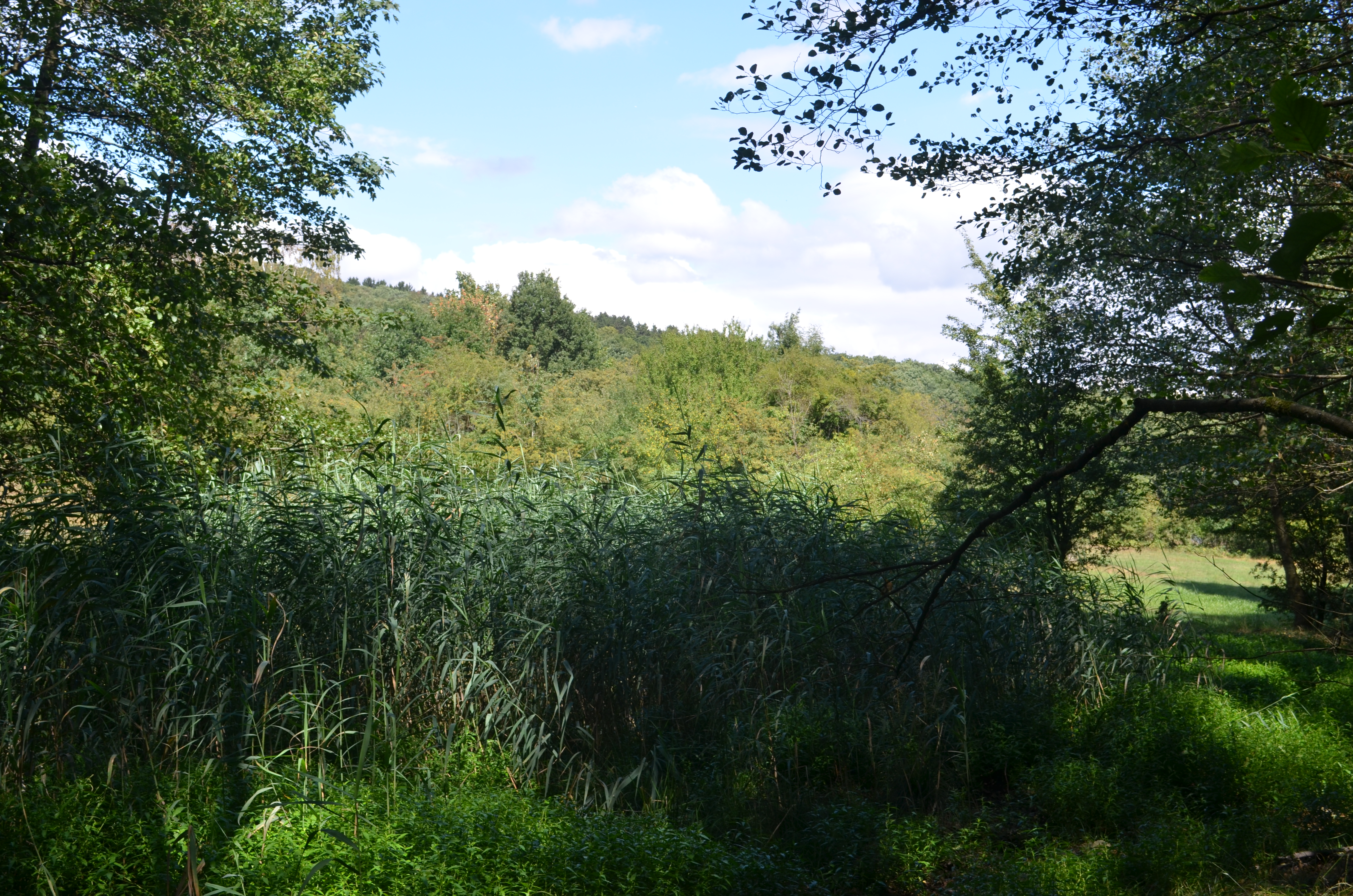 Kronberg, NSG Hinterste Neuwiese bei Kronberg